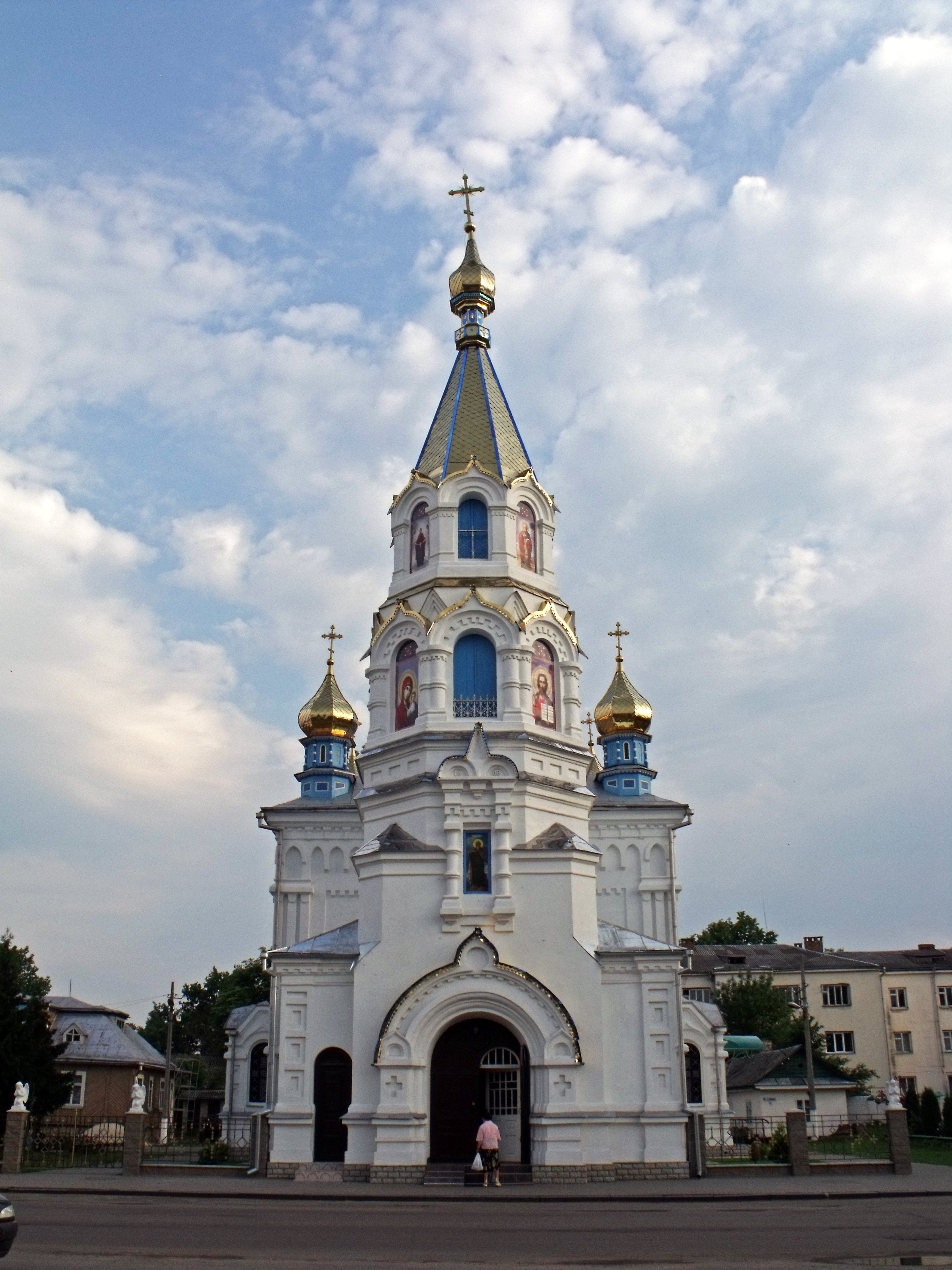 Іллінська церква (мур.), Дубно, вул.Д.Галицького,13